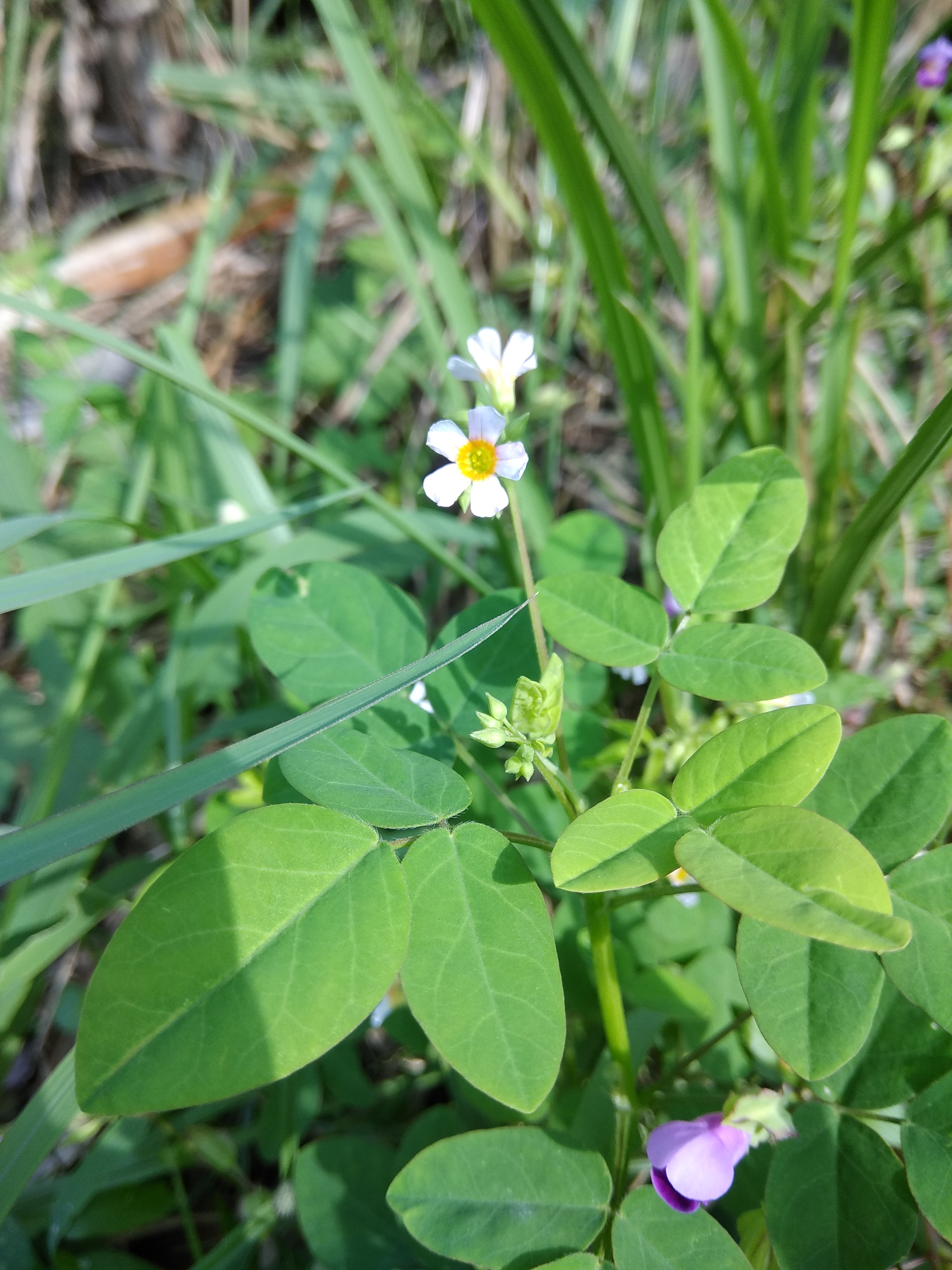 Oxalis barrelieri, Calincing tanah